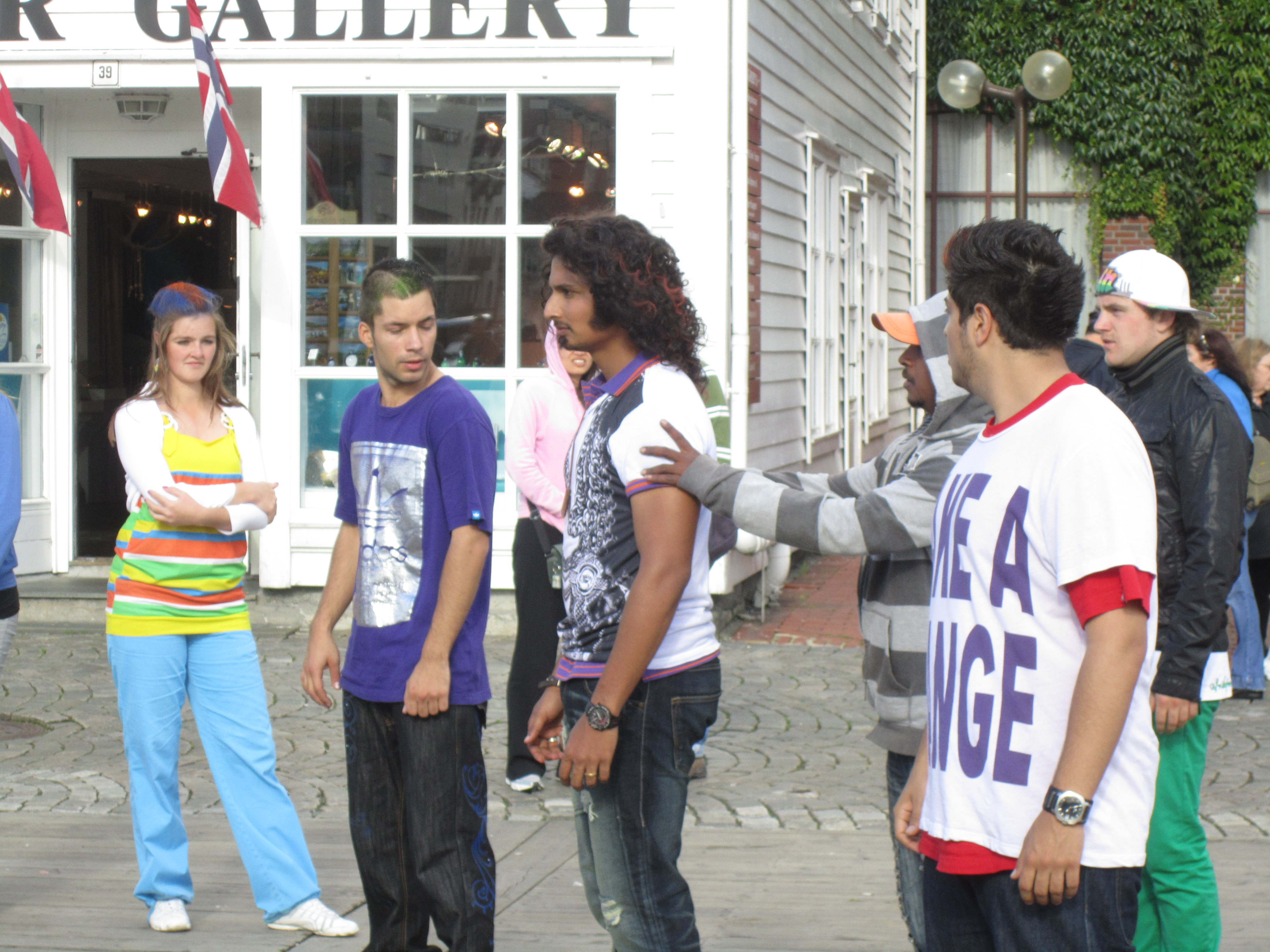 2010 - வெளிநாட்டில் தமிழ் படப்பிடிப்பு, பேர்கன் நகரின் Bryggen இல் 'கோ' படப்பிடிப்பு, நடனத்திற்குத் தயாராகும் நாயகன் ஜோவாவும், வெளிநாட்டு நடனக் குழுவினரும்.